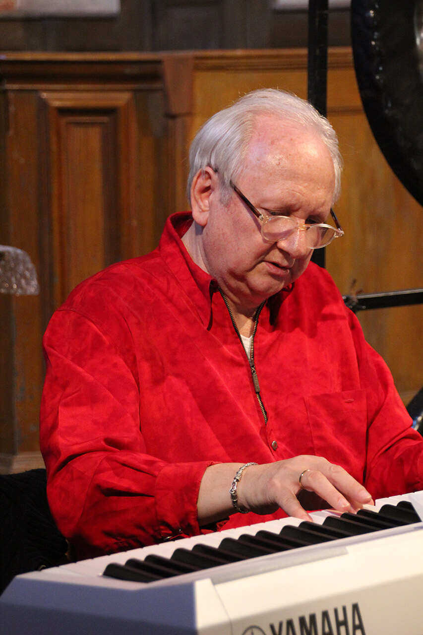 Aktuelles Bild des Komponisten, Pianisten, Musikverleger, Dirigent und Fotografen Berthold Paul